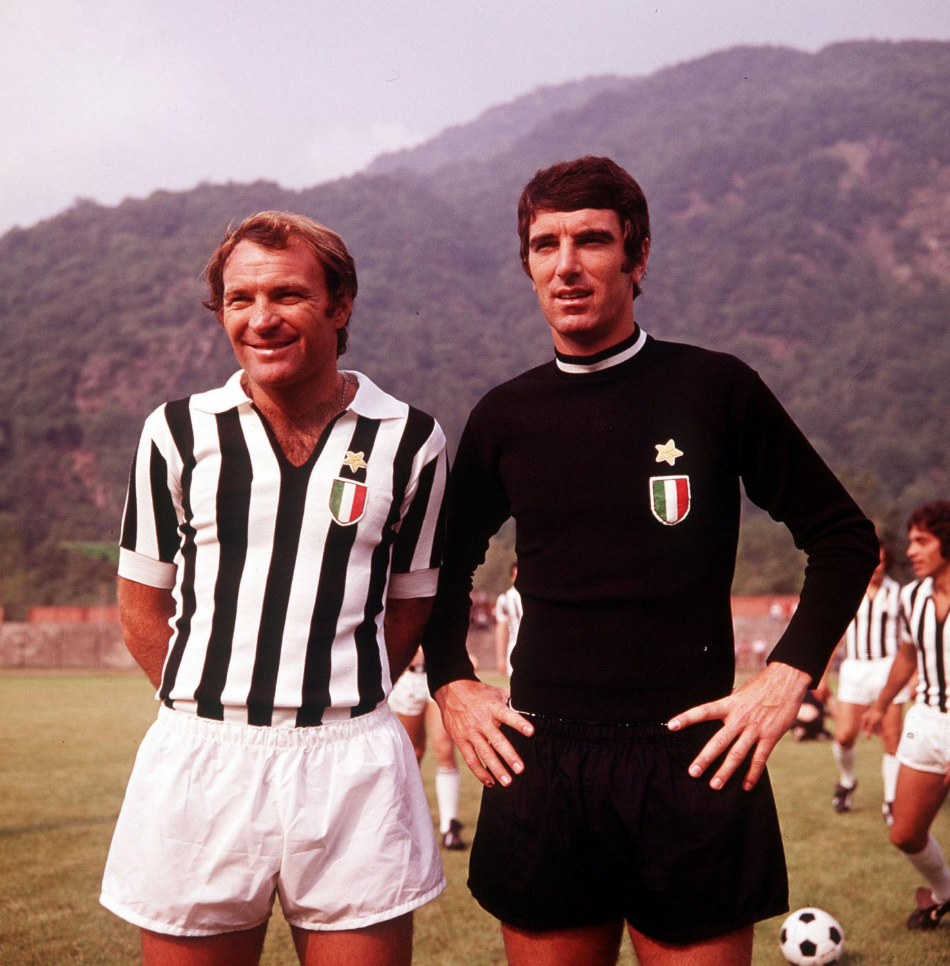 Villar Perosa, estate 1972. Da sinistra: l'attaccante José Altafini e il portiere Dino Zoff, neoacquisti della Juventus per la stagione 1972-73, durante il ritiro precampionato.